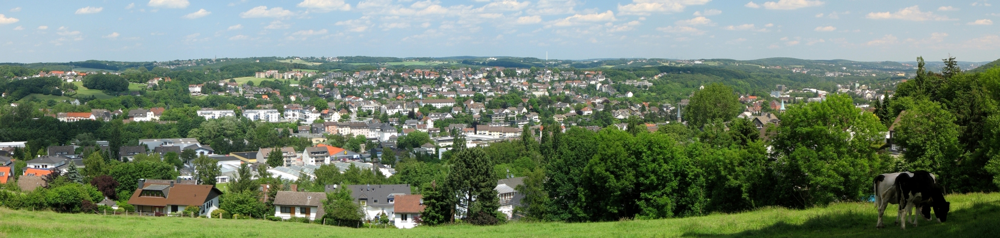 Gevelsberg Panorama im Sommer